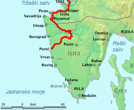 Porečanka zemljevid